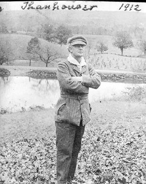 Lucius Henderson en octobre 1912, durant la réalisation de "The Forest Rose"